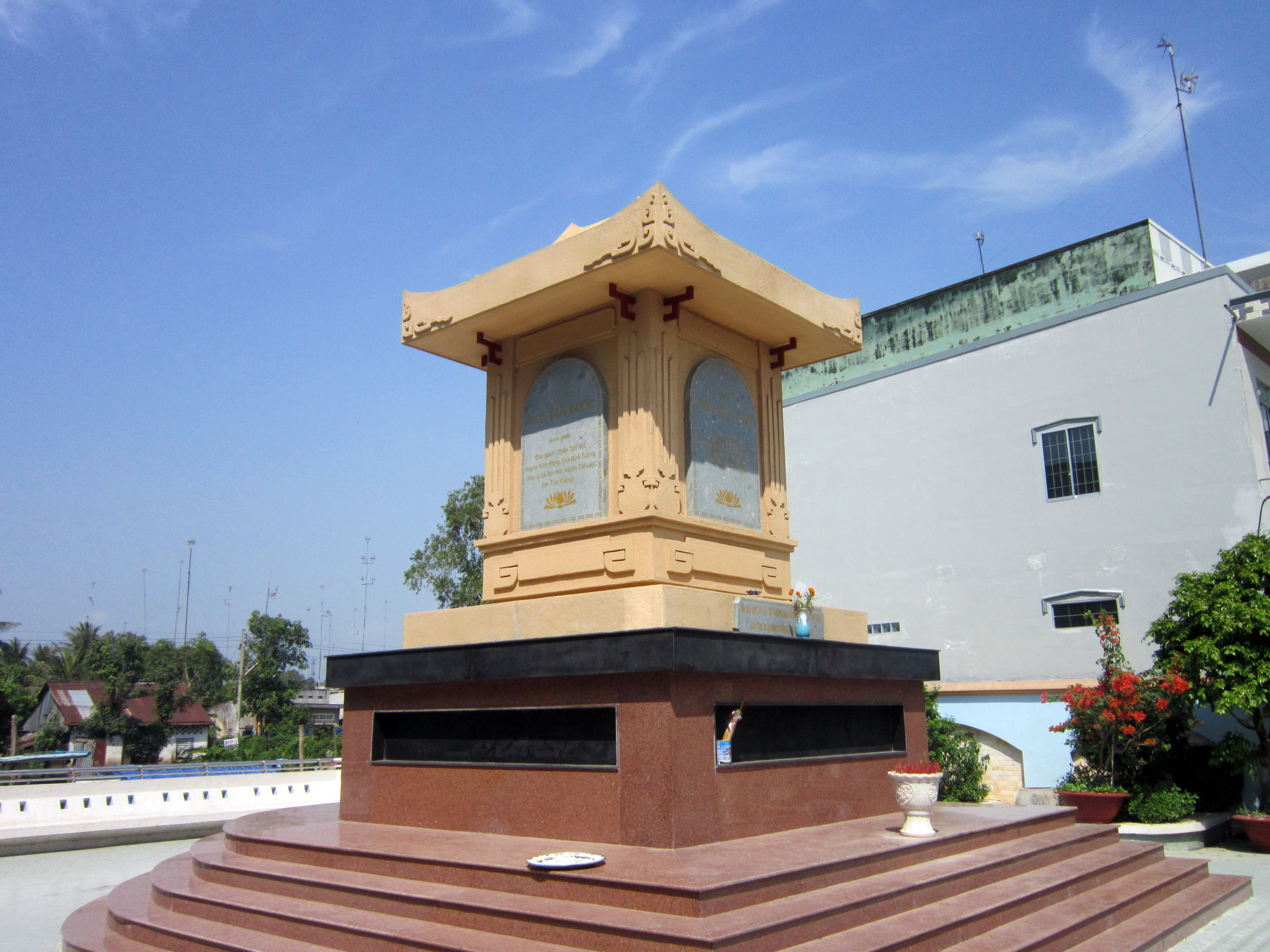 Nơi quân Pháp xử chém chết Tứ Kiệt (chợ Cai Lậy, huyện Cai Lậy, tỉnh Tiền Giang, Việt Nam).